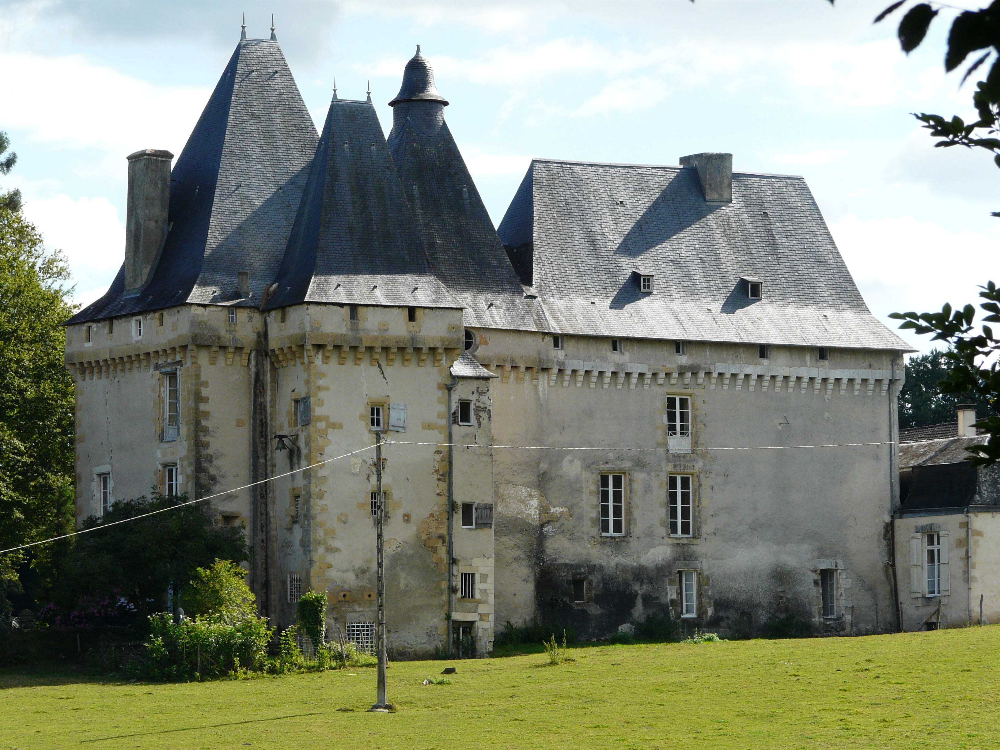 La façade nord du château de Mavaleix, Chalais, Dordogne, France